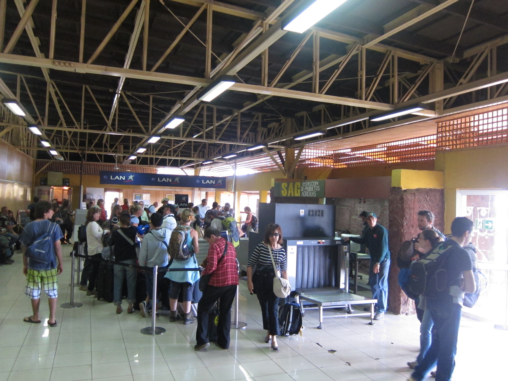 Check in.